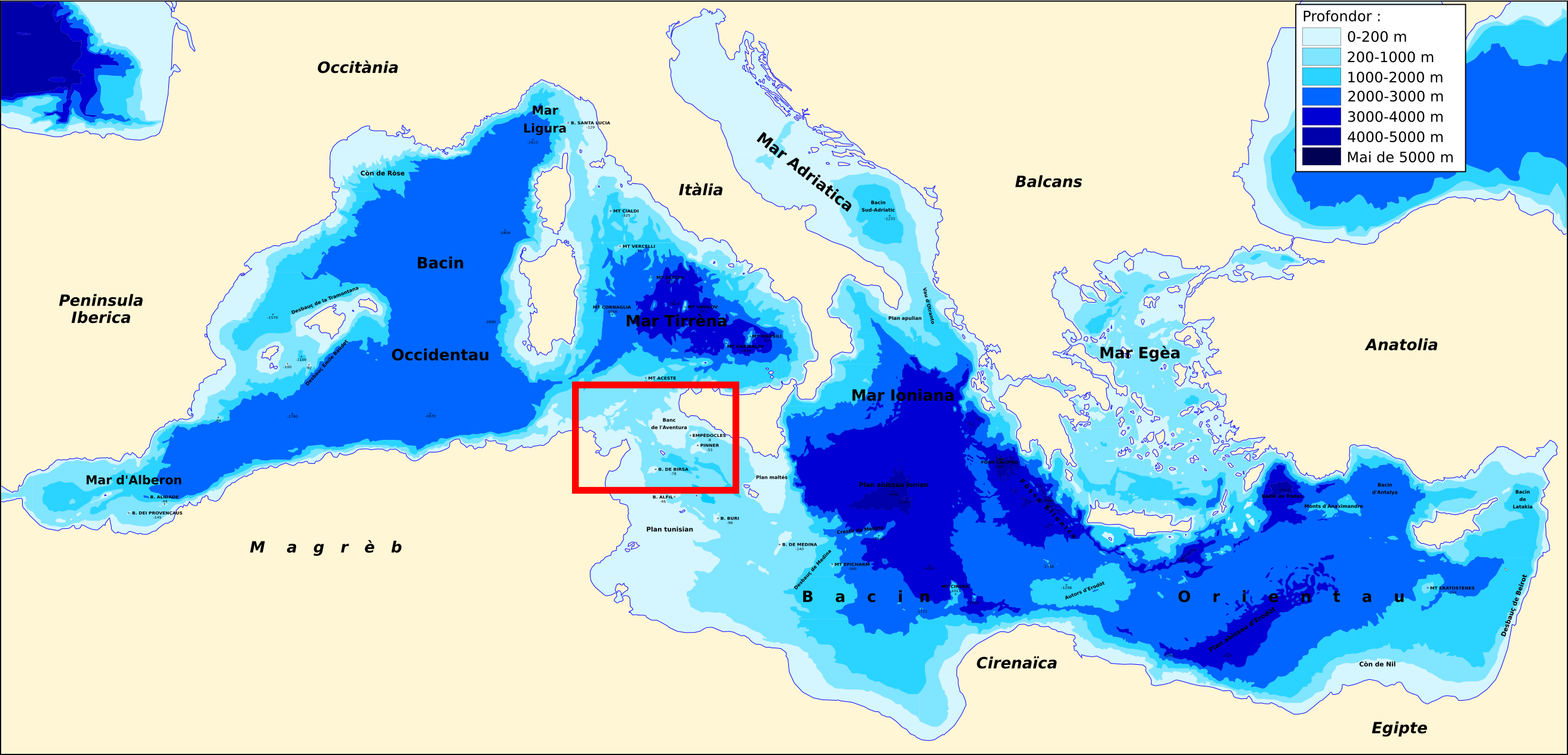 Localizacion de l'Estrech de Sicília.